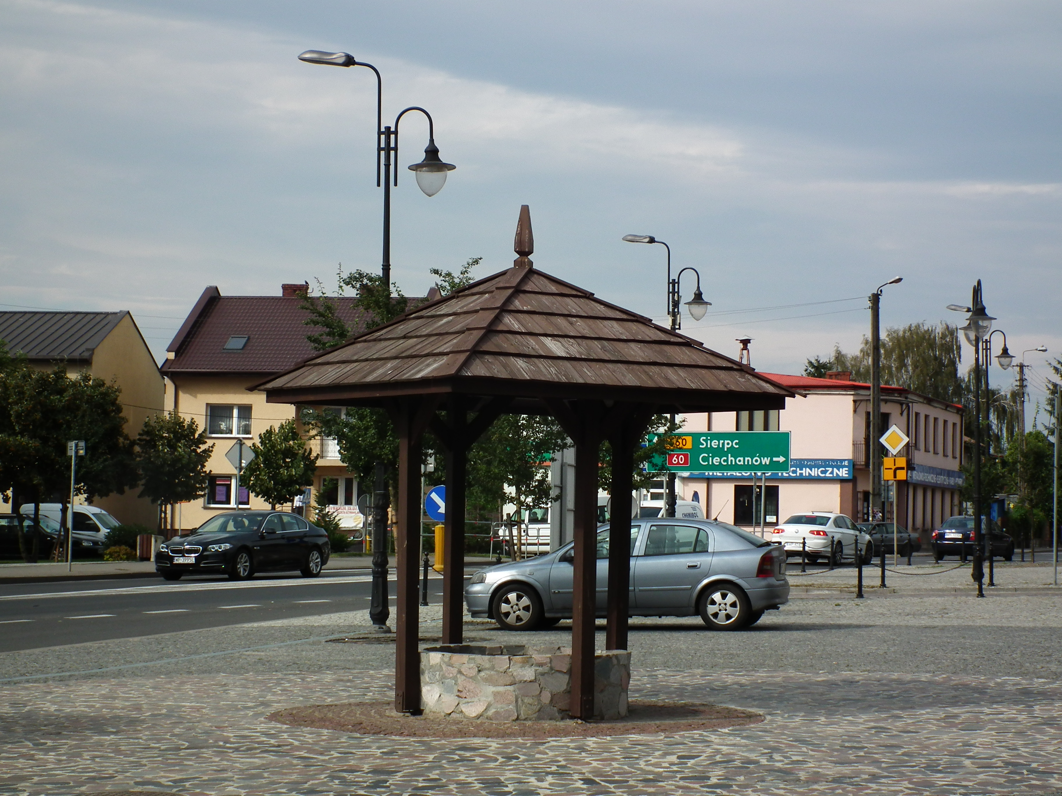 Bielsk - rynek.